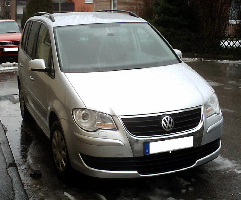 Das Bild stellt einen VW Touran mit EcoFuel-Antrieb dar.